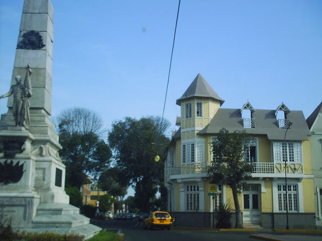 Obelisco memorial en la Avenida San Martin en Barranco. This picture was taken by me on april 10, 2006 with a Vivitar camera